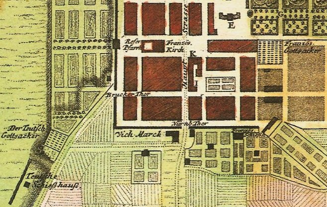 Ausschnitt aus dem Grundriss von Alt- und Neustadt Erlangen sowie Umgebung. Kolorierter Kupferstich (1721) von Johann Christoph Homann, verlegt von Johann Baptist Homann.